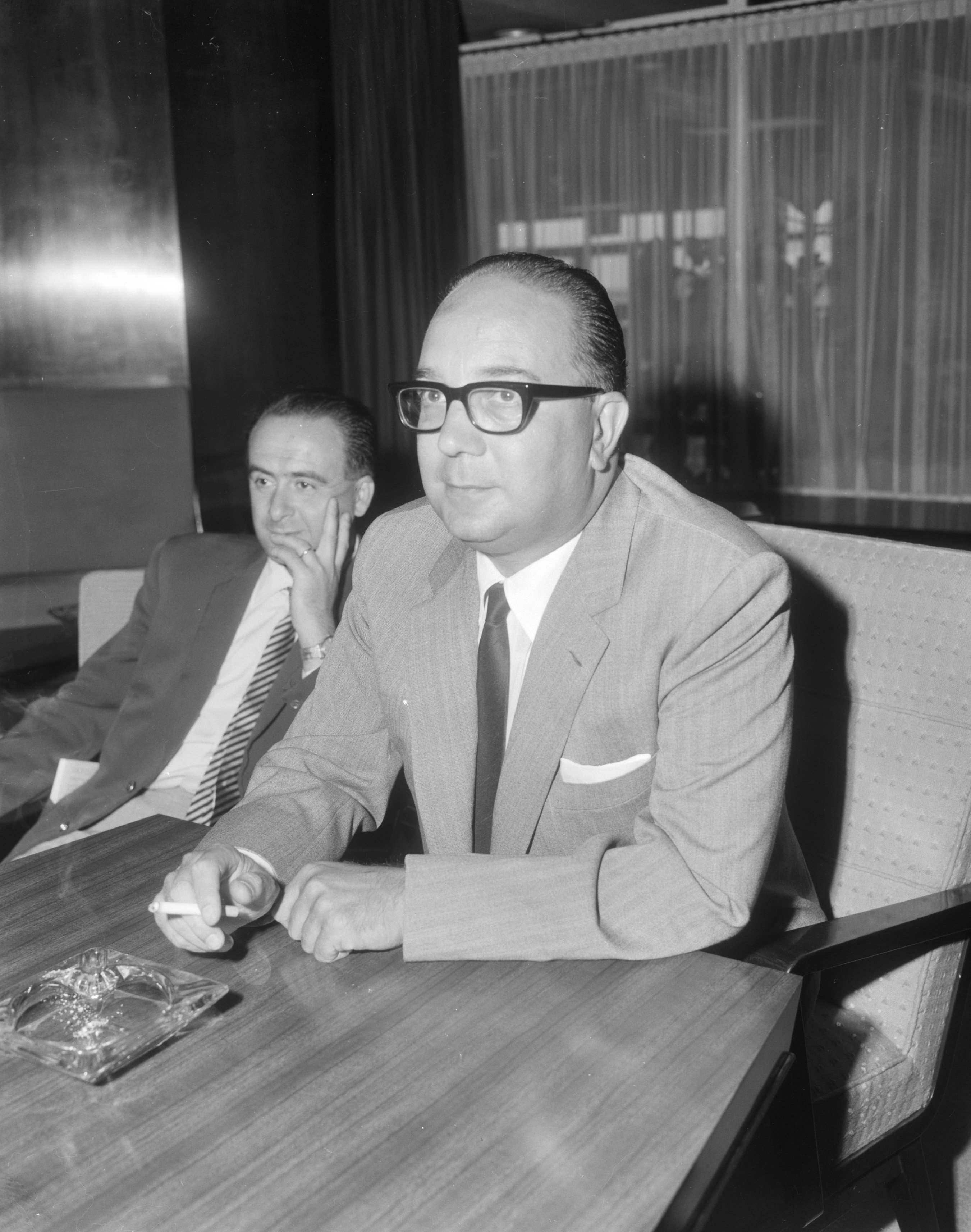 Collectie / Archief : Fotocollectie Anefo Reportage / Serie : [ onbekend ] Beschrijving : Aankomst burgemeester van Rome, A. Petruci op Schiphol Datum : 20 augustus 1965 Locatie : Noord-Holland, Schiphol Trefwoorden : aankomsten, burgemeesters Persoonsnaam : Petruci, A. Fotograaf : Bilsen, Joop van / Anefo Auteursrechthebbende : Nationaal Archief Materiaalsoort : Negatief (zwart/wit) Nummer archiefinventaris : bekijk toegang 2.24.01.04 Bestanddeelnummer : 918-0914